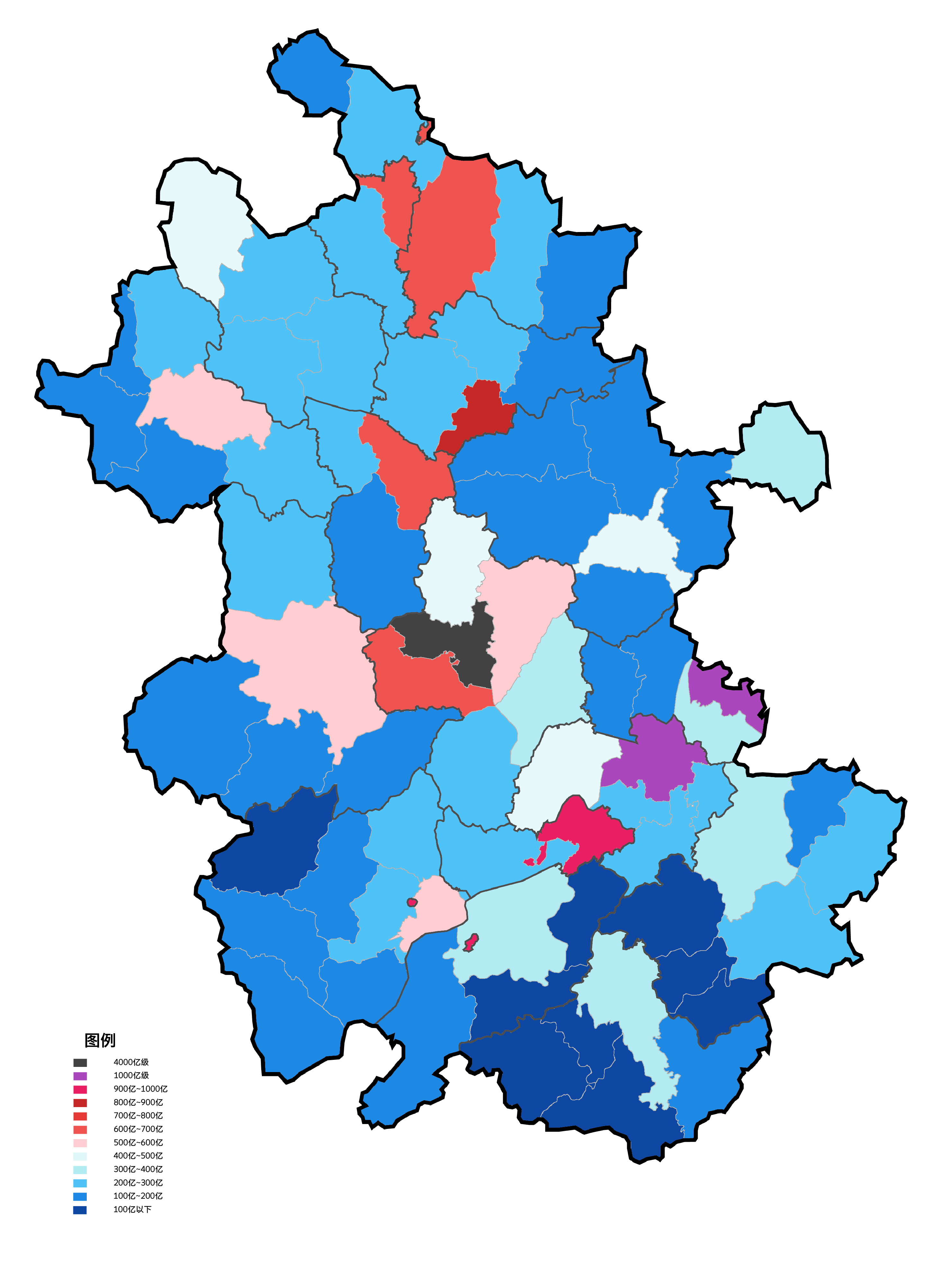 中文（中国大陆）: 安徽省县市根据2017年地区生产总值填色地图